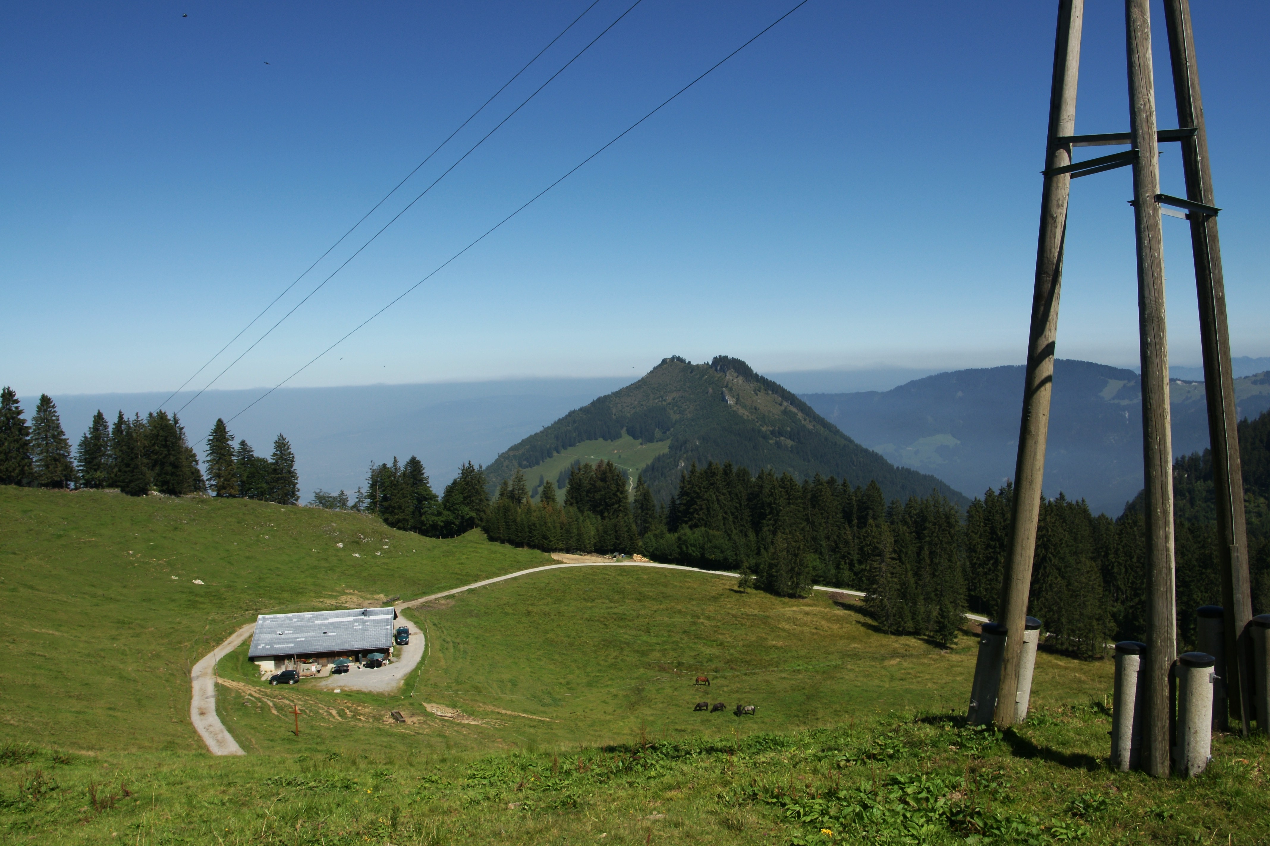 gesehen auf dem Rundwanderweg vom Bergdorf Ebnit (Kirche), Pfarrers Älpele, Fluhereck, Schöner-Mann-Alpe, Hinterbergalpe und zurück. Mit Blick auf den Staufen. Der Weg am Fuße des Staufens führt von Schuttannen (:de:Hohenems